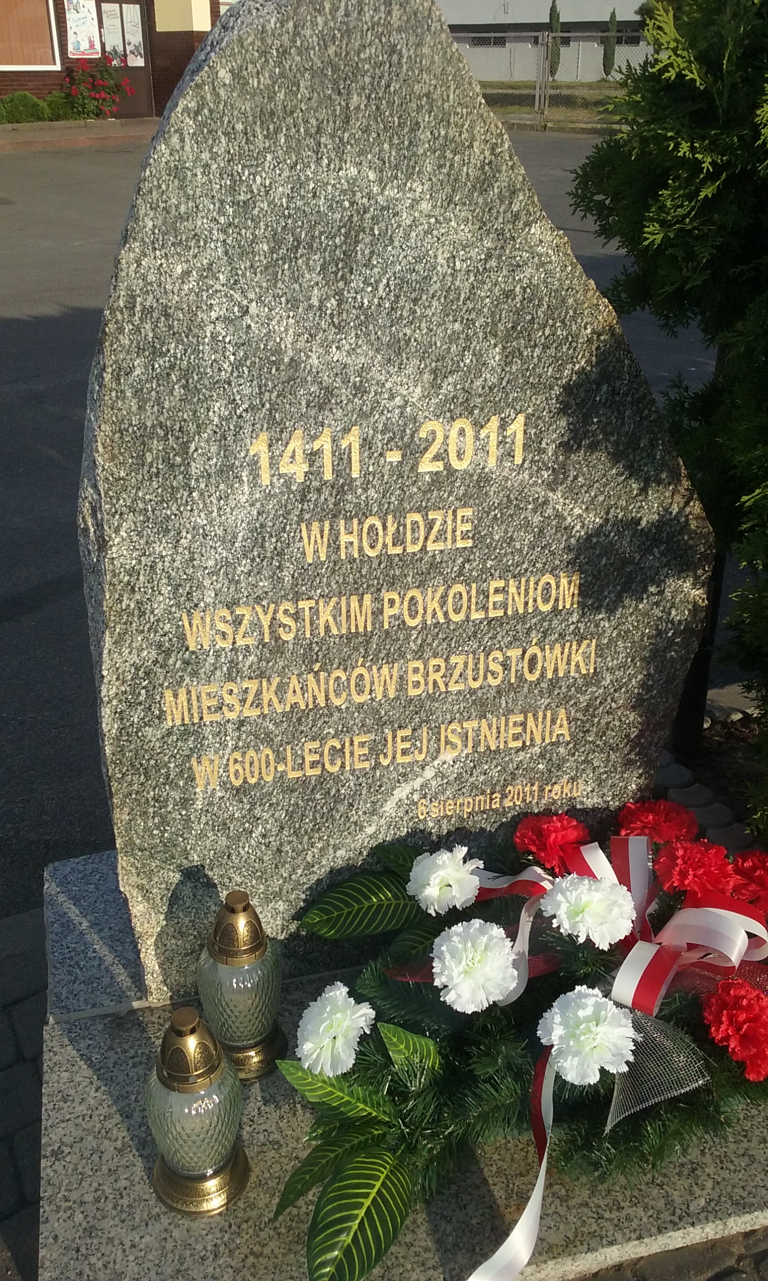 Gałz upamiętniający 600-letnią historie Brzustówki, jednej z dzielnic Tomaszowa Mazowieckiego